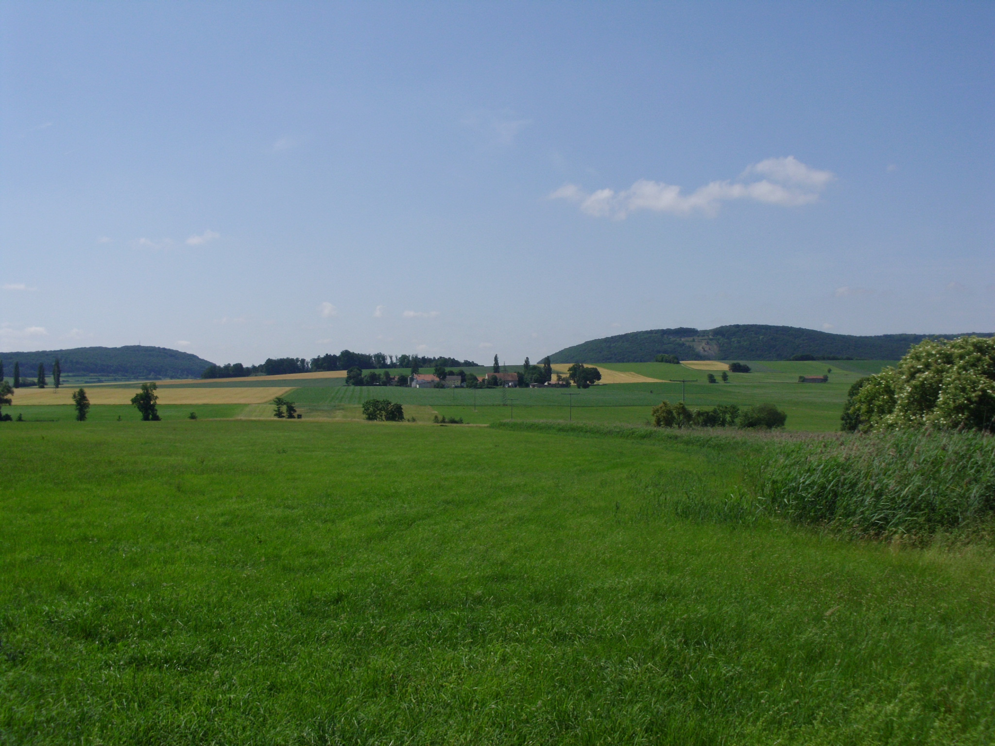 Hagenau, Ortsteil von Treuchtlingen im Landkreis Weißenburg-Gunzenhausen